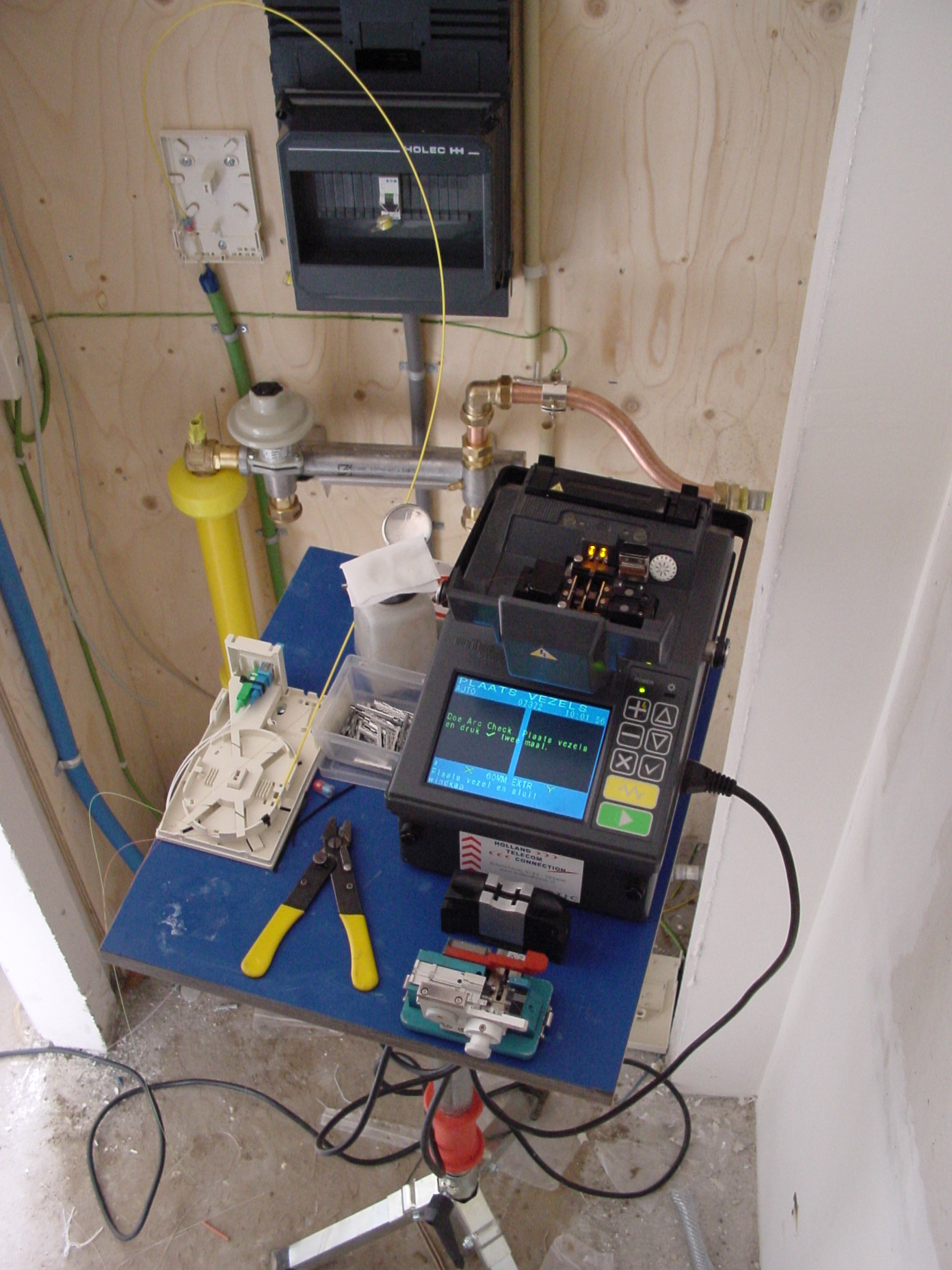 voorbeeld van een fuselasmachine in gebruik